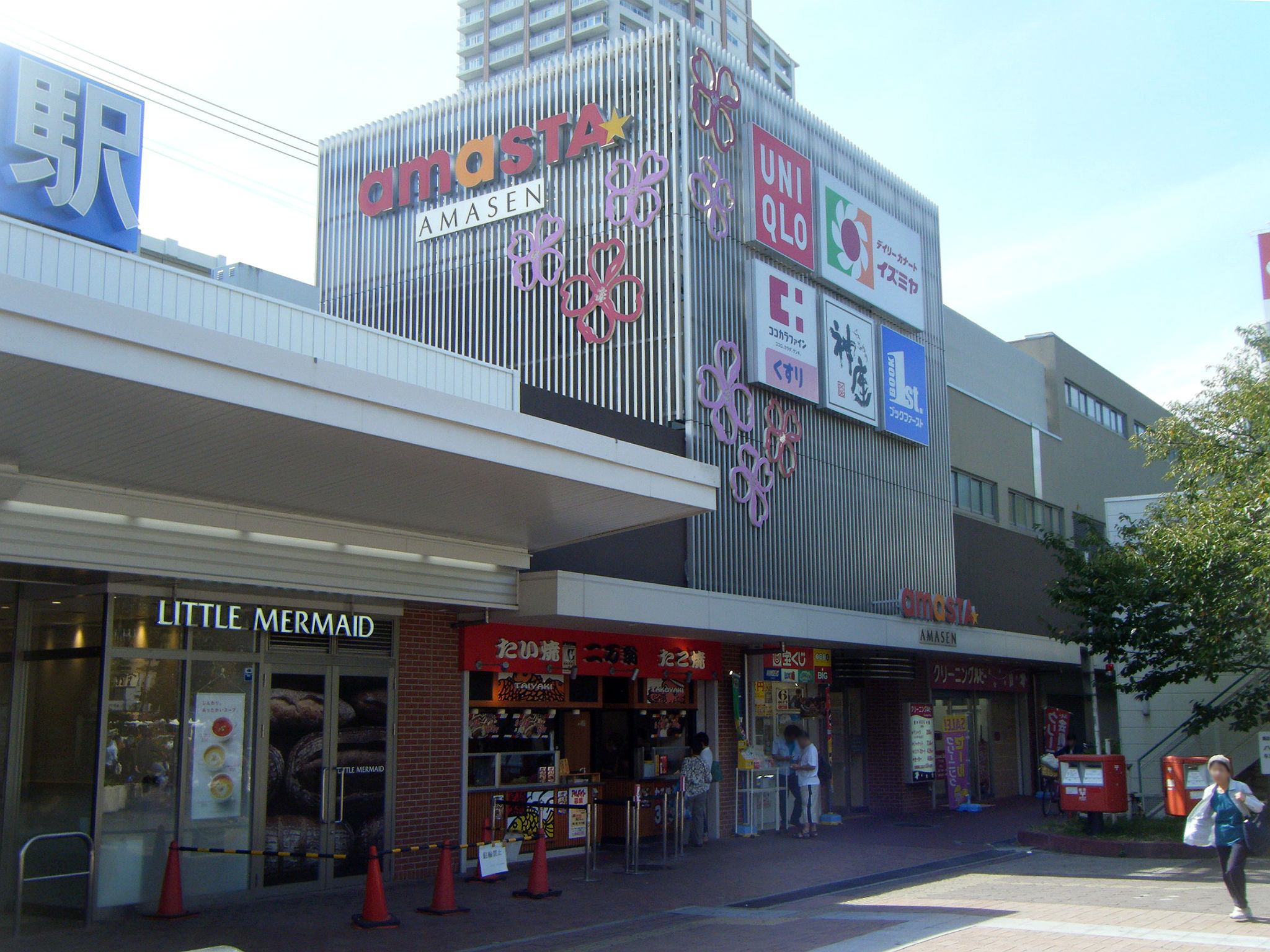 アマスタ アマセン 外観